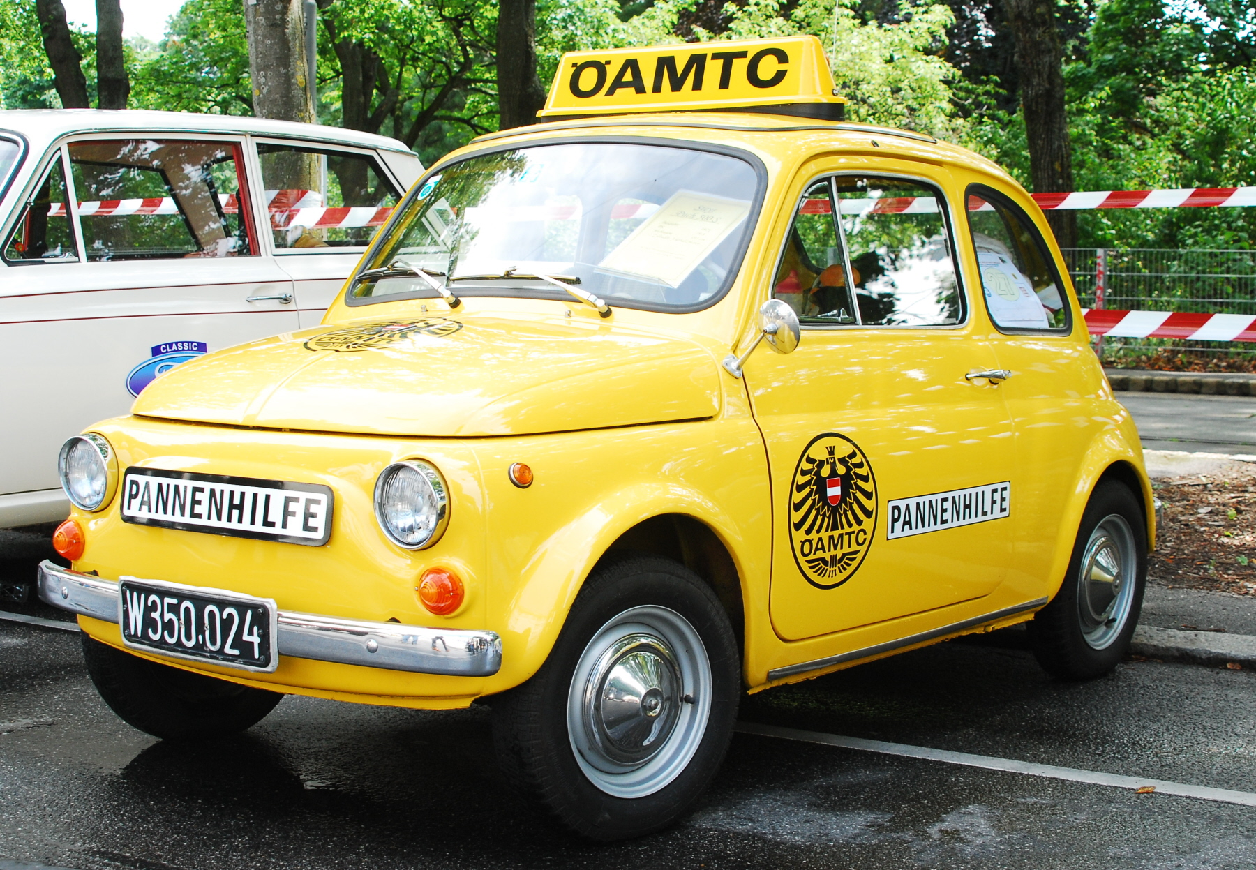 Puch 500, ein ehemaliger ÖAMTC-Pannenwagen, anlässlich eines Oldtimer-Treffens auf der Mariahilfer Straße vor dem Technischen Museum in Wien.